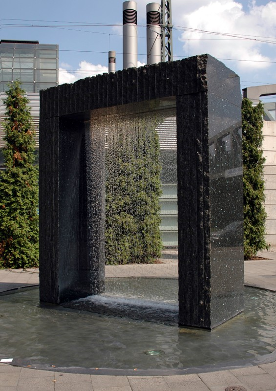 Foto: Brunnen vor den Arcaden Heinz Mack: Wassertor (2001) Fotografiert im August 2004 Benutzer:sec11 Copyright Status: GNU Freie Dokumentationslizenz